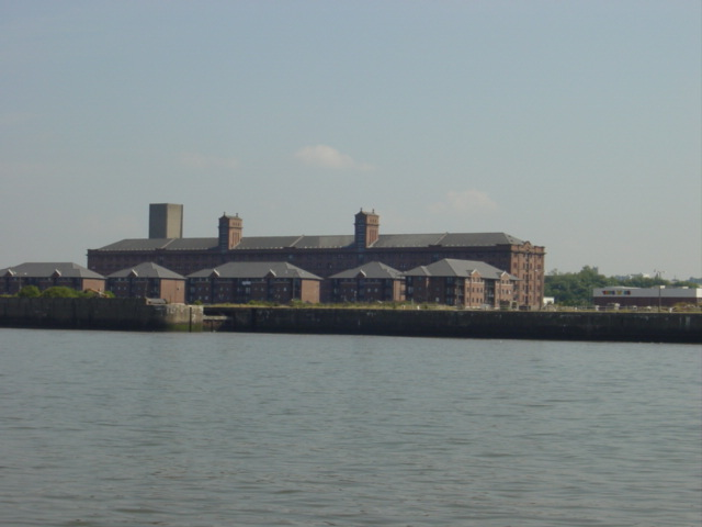 Trafalgar Dock apartments